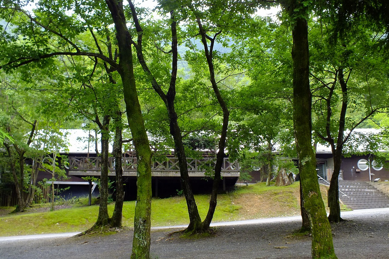 しそうよい温泉 木陰から見る温泉棟